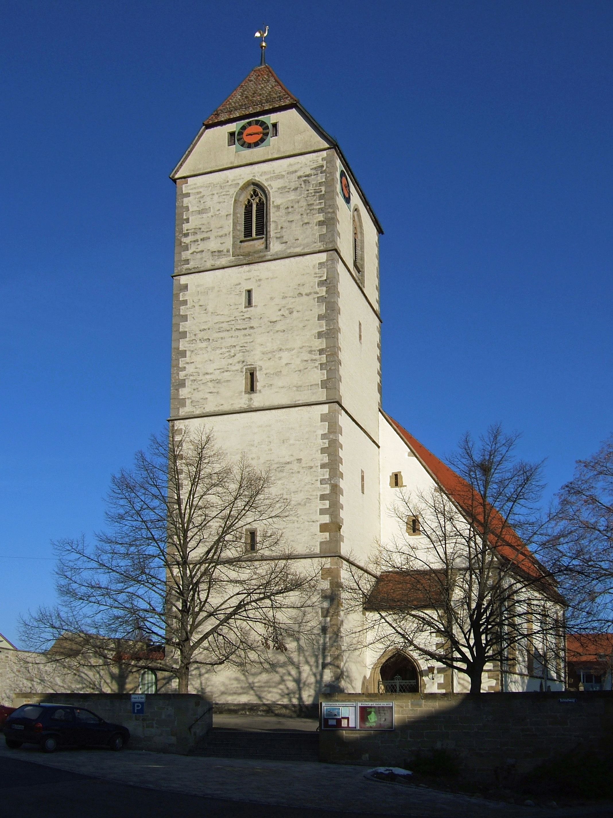 St.-Veit-Kirche Gärtringen von Westen